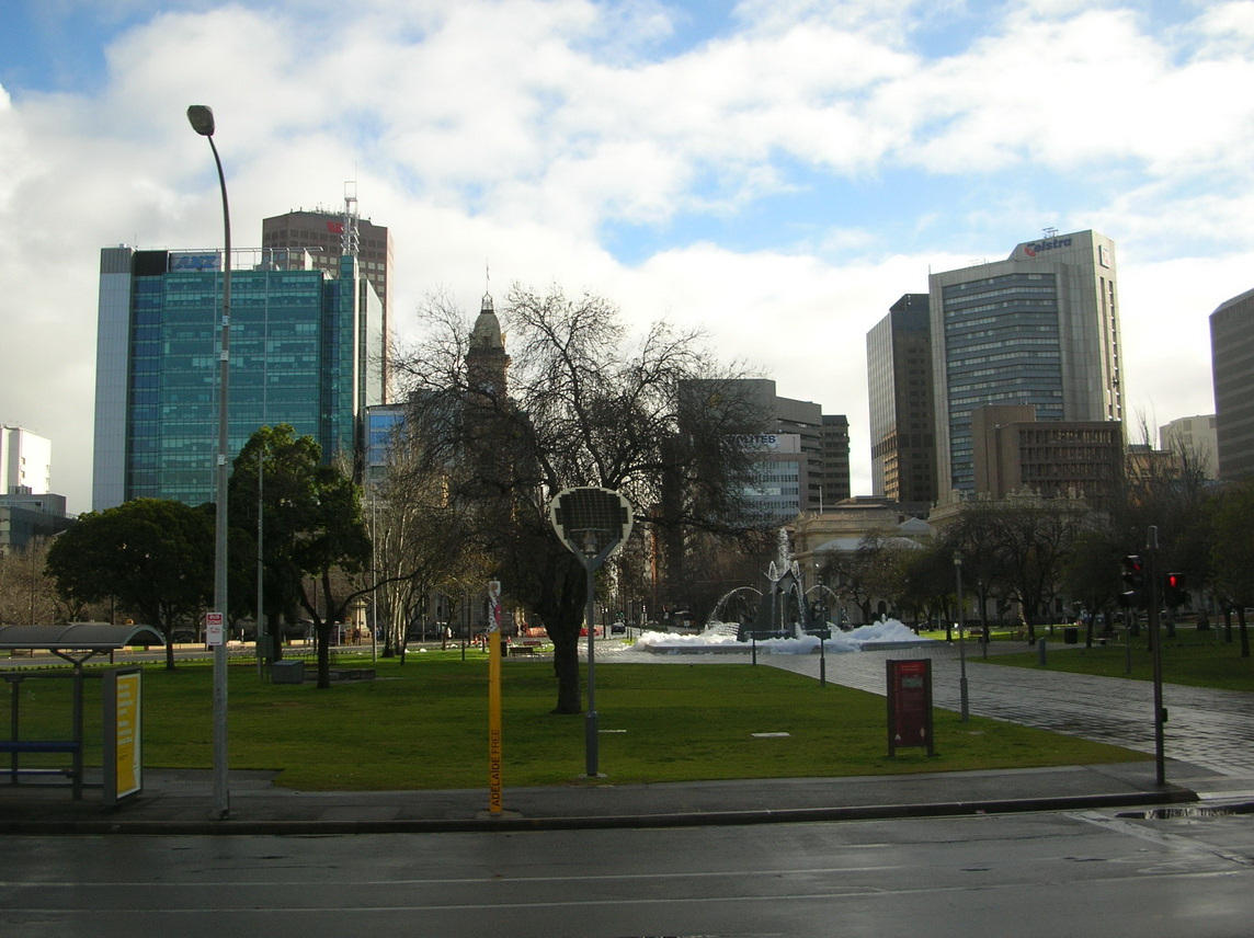 維多利亞廣場 Victoria Square, Adelaide looking North